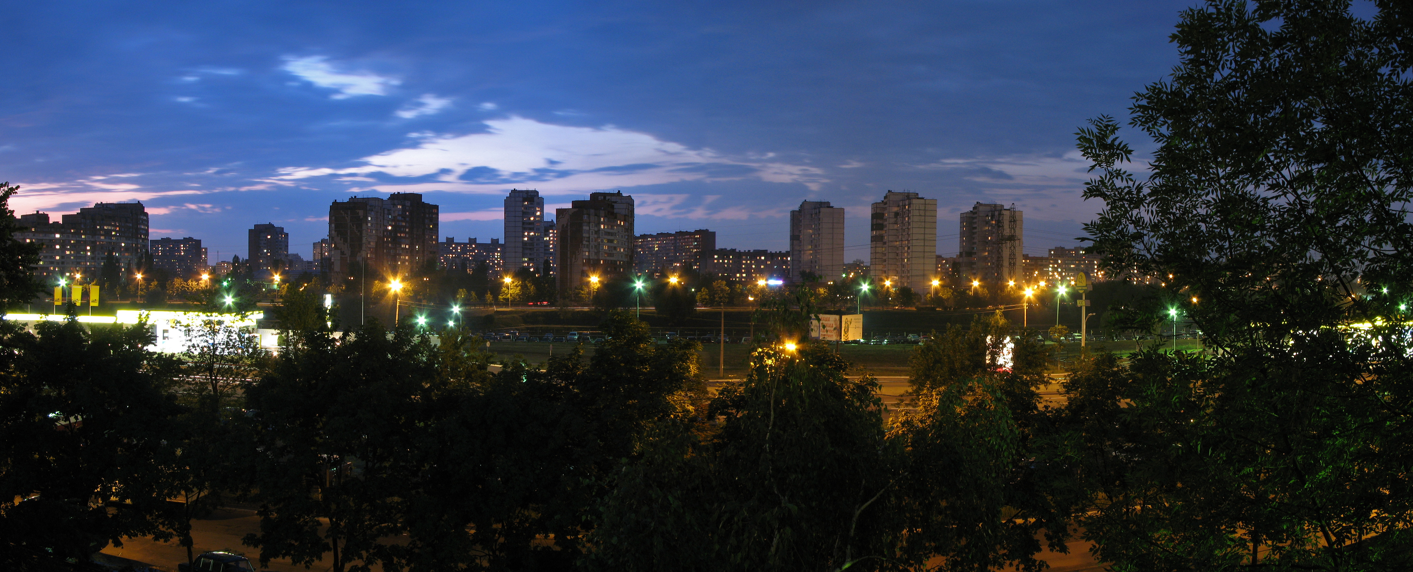 Voskresenka, Kyiv, Kyiv city, Ukraine